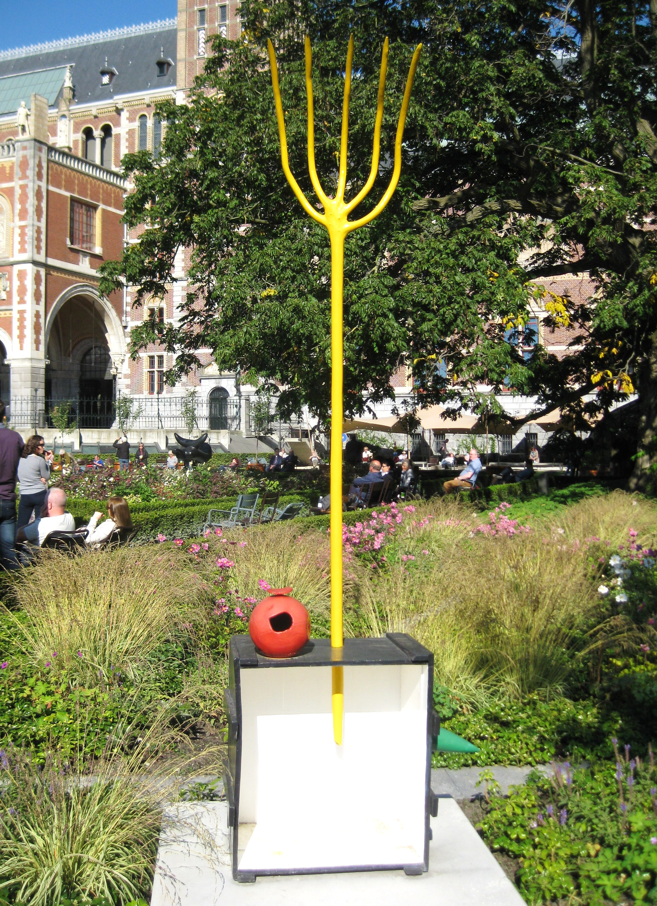 Femme et oiseau1967 beschilderd brons Joan Miró